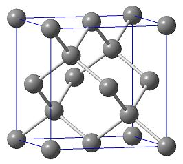 Autore Rennmausprofi Fonte Disposizione degli ioni Tl- all'interno del reticolo cristallino di NaTl